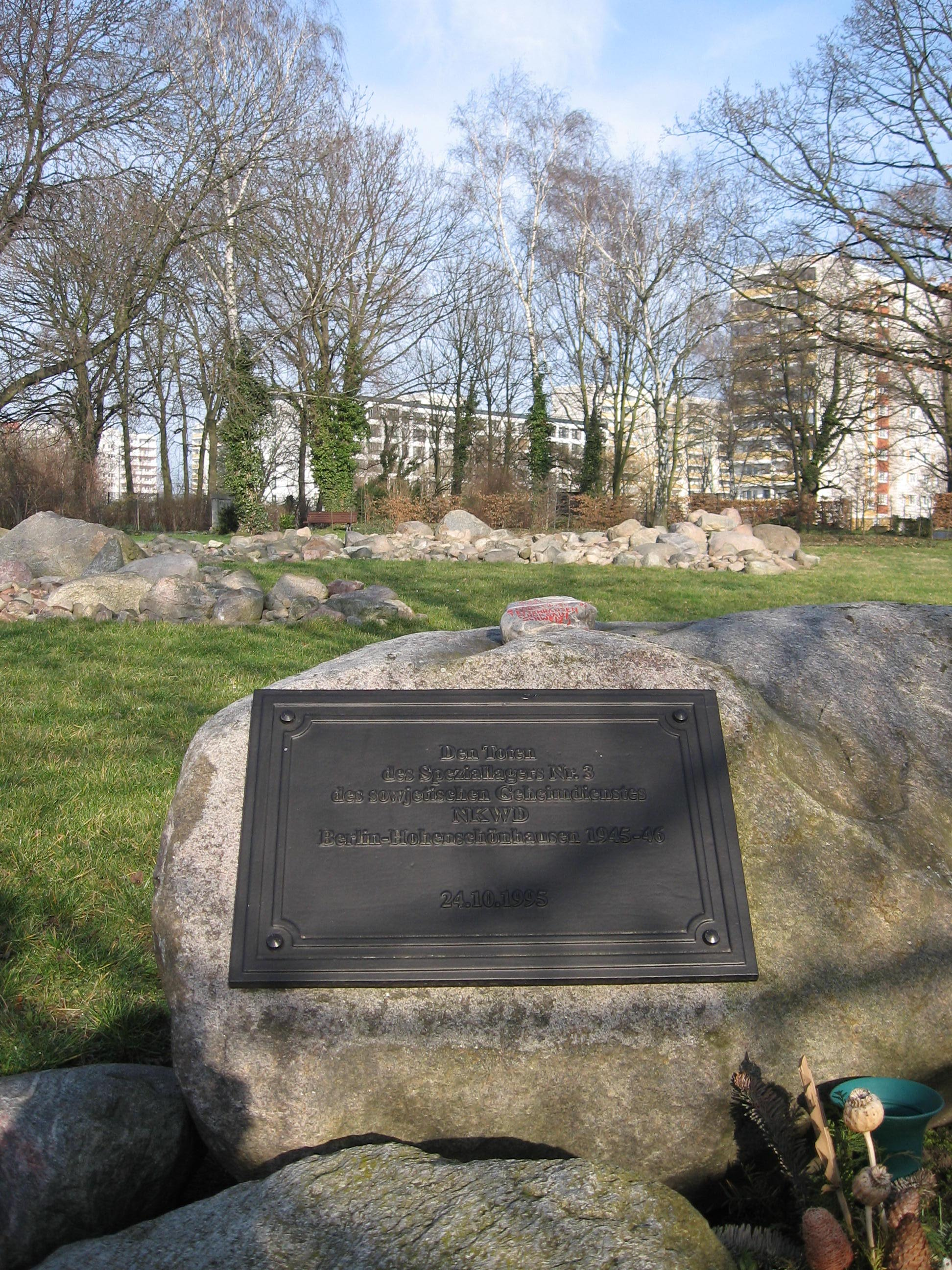 Gedenkstein auf dem Friedhof an der Gärtnerstraße / Ferdinand-Schultze-Straße für die Opfer des Speziallagers 3 in Berlin-Hohenschöhnhausen.